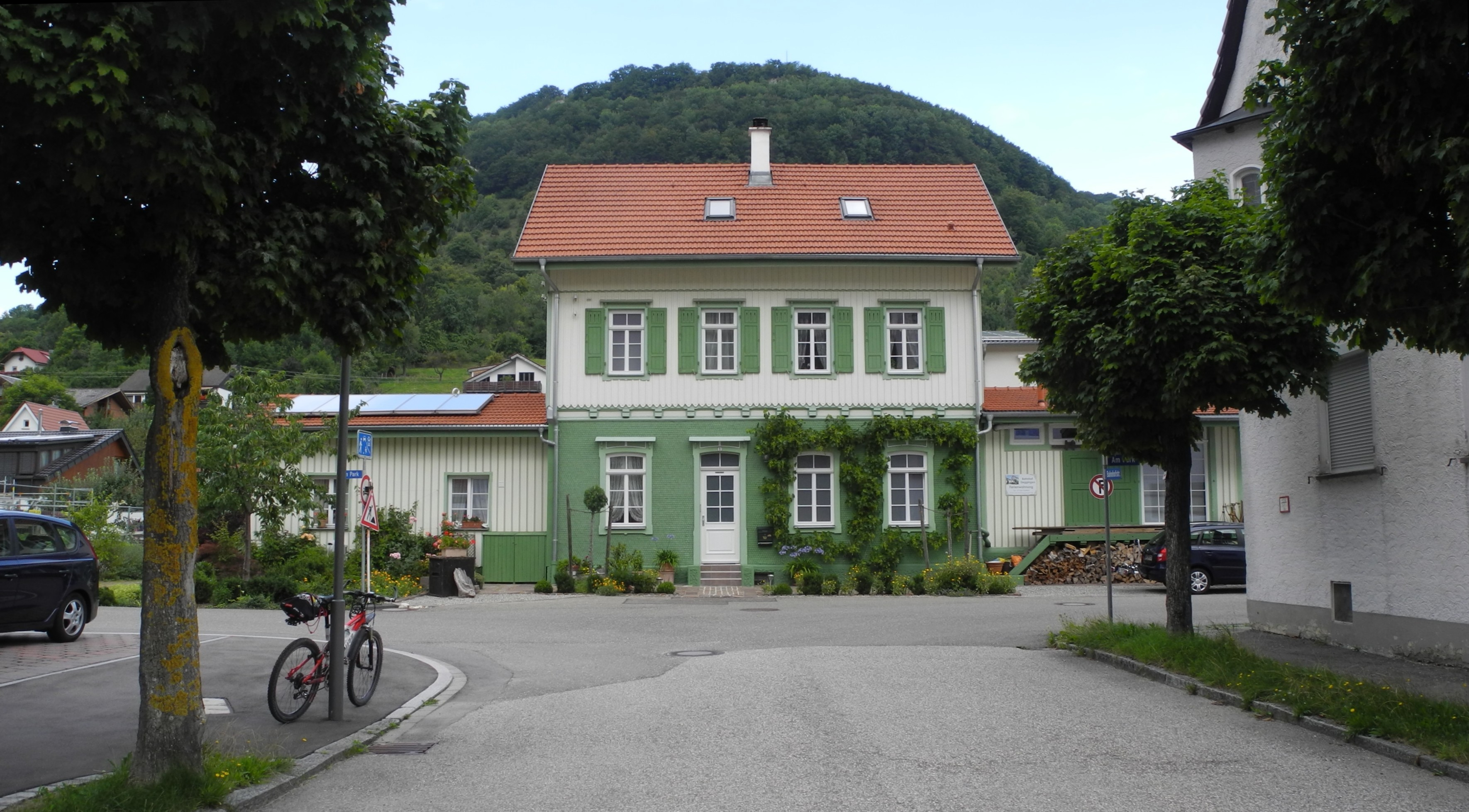 Deggingen Fils - Bahnhof bis 1983